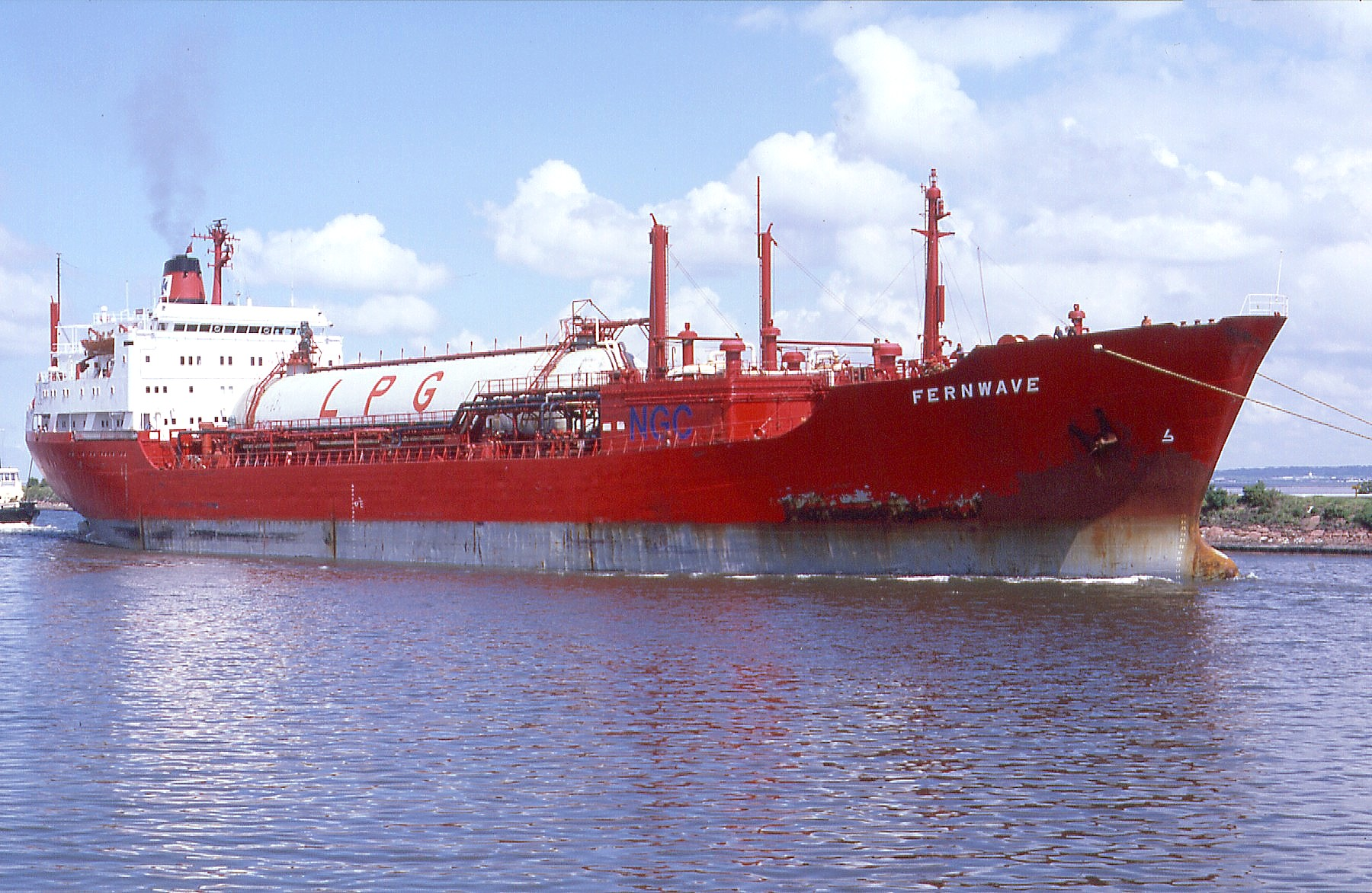 MS "Fernwave" (1972)